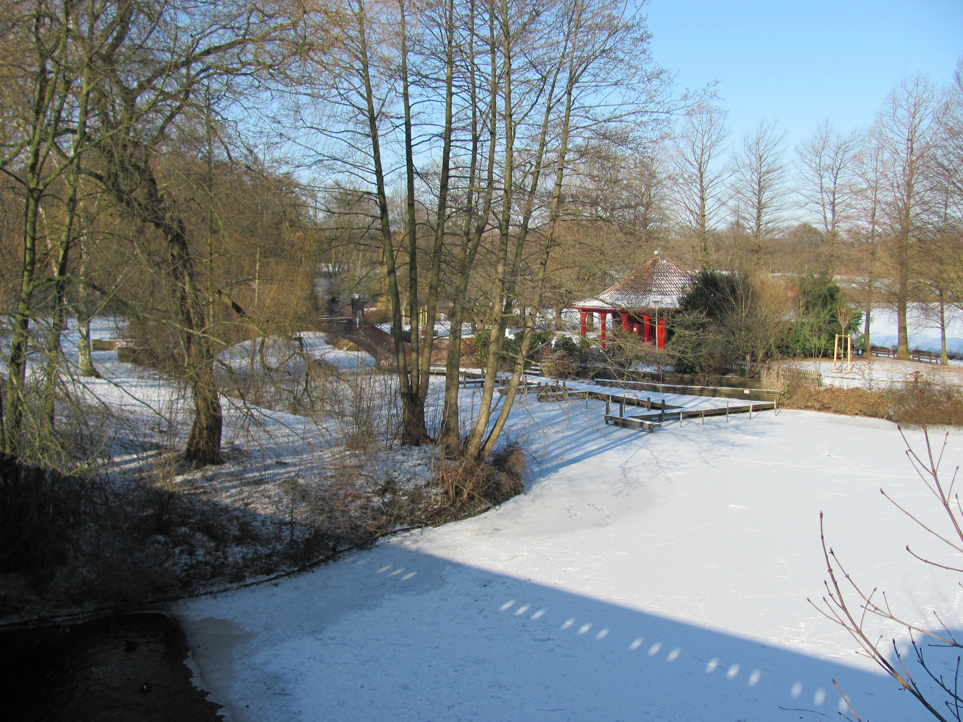 Liebesinsel im Stadtparksee, Blick von der Parkseebrücke am Südring